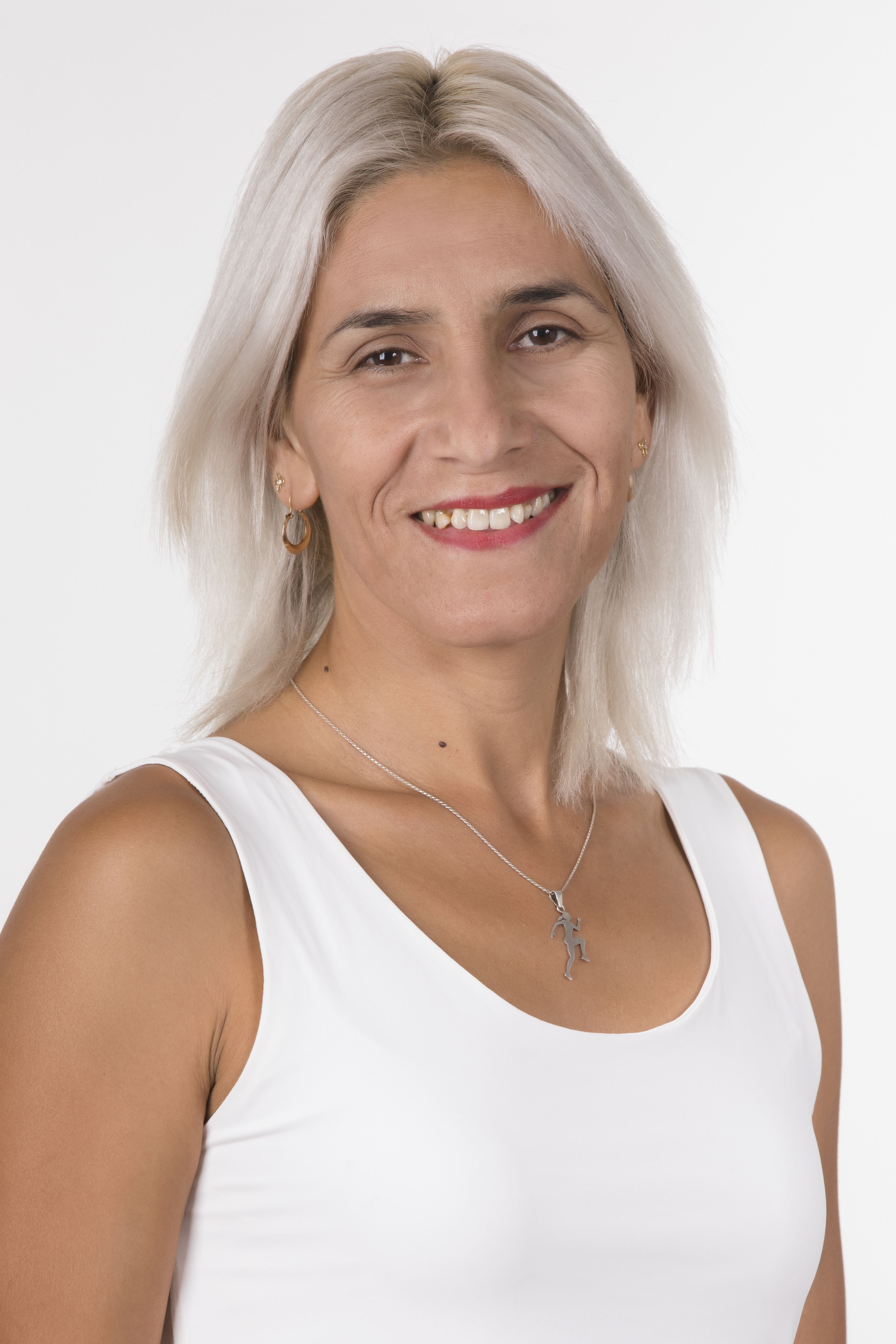 Erika Olivera de la Fuente en la fotografía oficial de diputados periodo 2018-2022. (Fotos: Christel Andler, René Lescornez, Johanna Zárate)